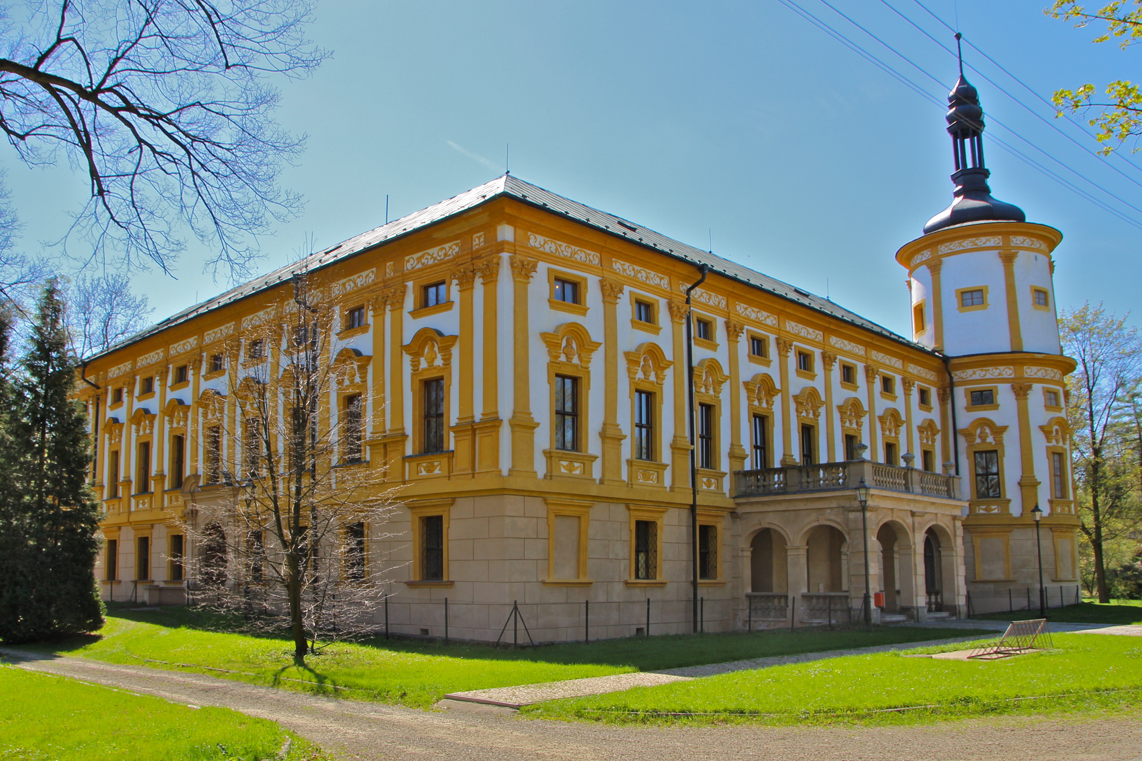 Linhartovy - wieś w kraju morawsko-śląskim, w Czechach.